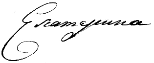 Автограф императрицы Екатерины II